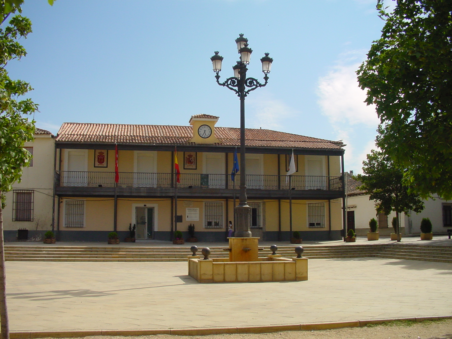 Ayuntamiento de Daganzo de Arriba.